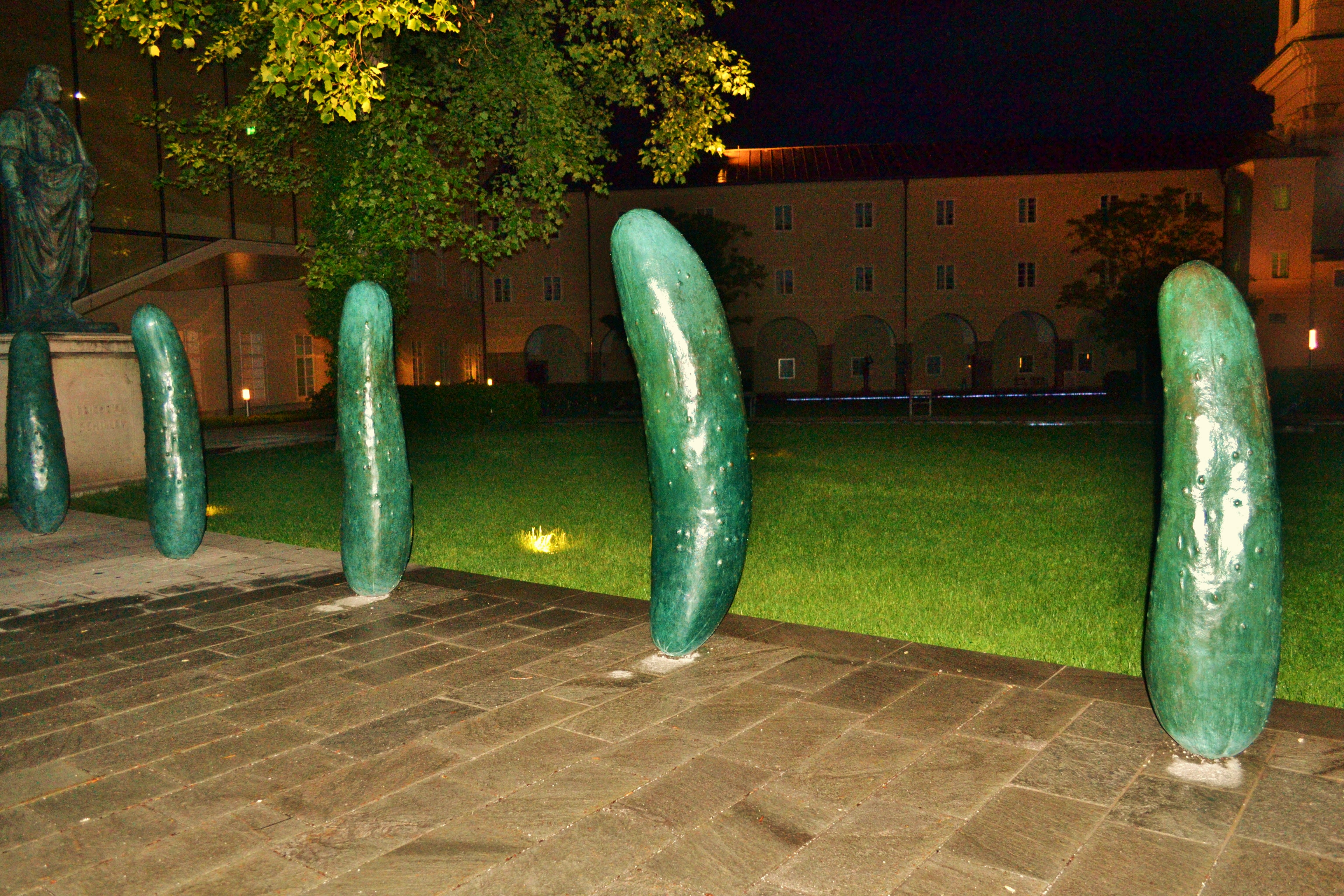 Арт-проект "Огурцы" Эрвина Вюрма в Зальцбурге